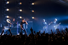 Oerrock festival optreden kane publiek